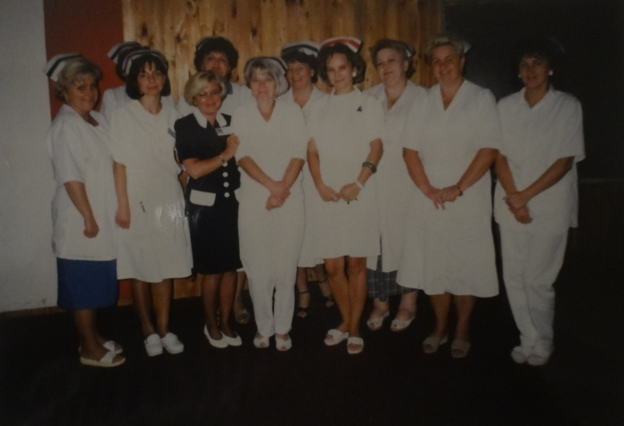 Stargard Szczeciński, kadra pielęgniarska batalionu medycznego w spotkaniu z Naczelną POW.